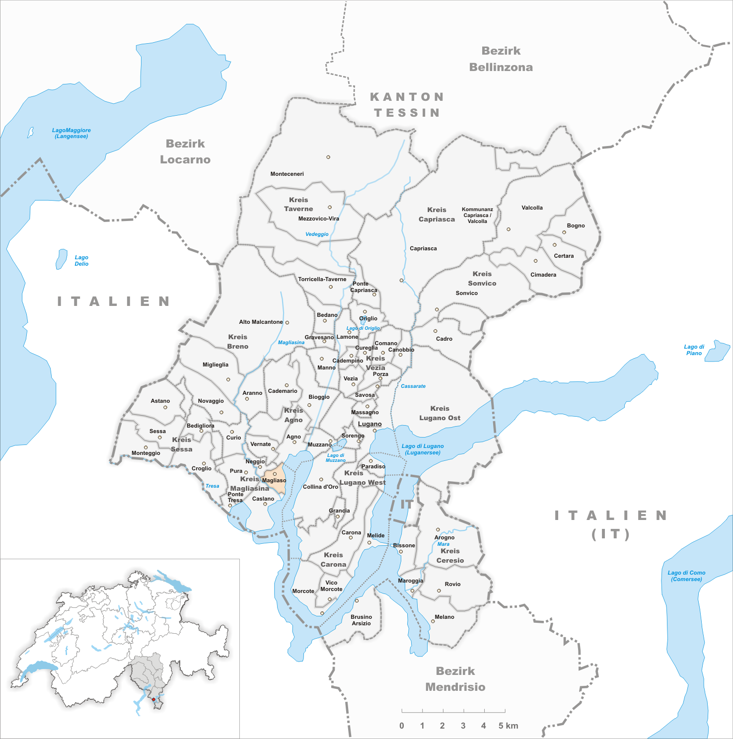 Municipality Magliaso